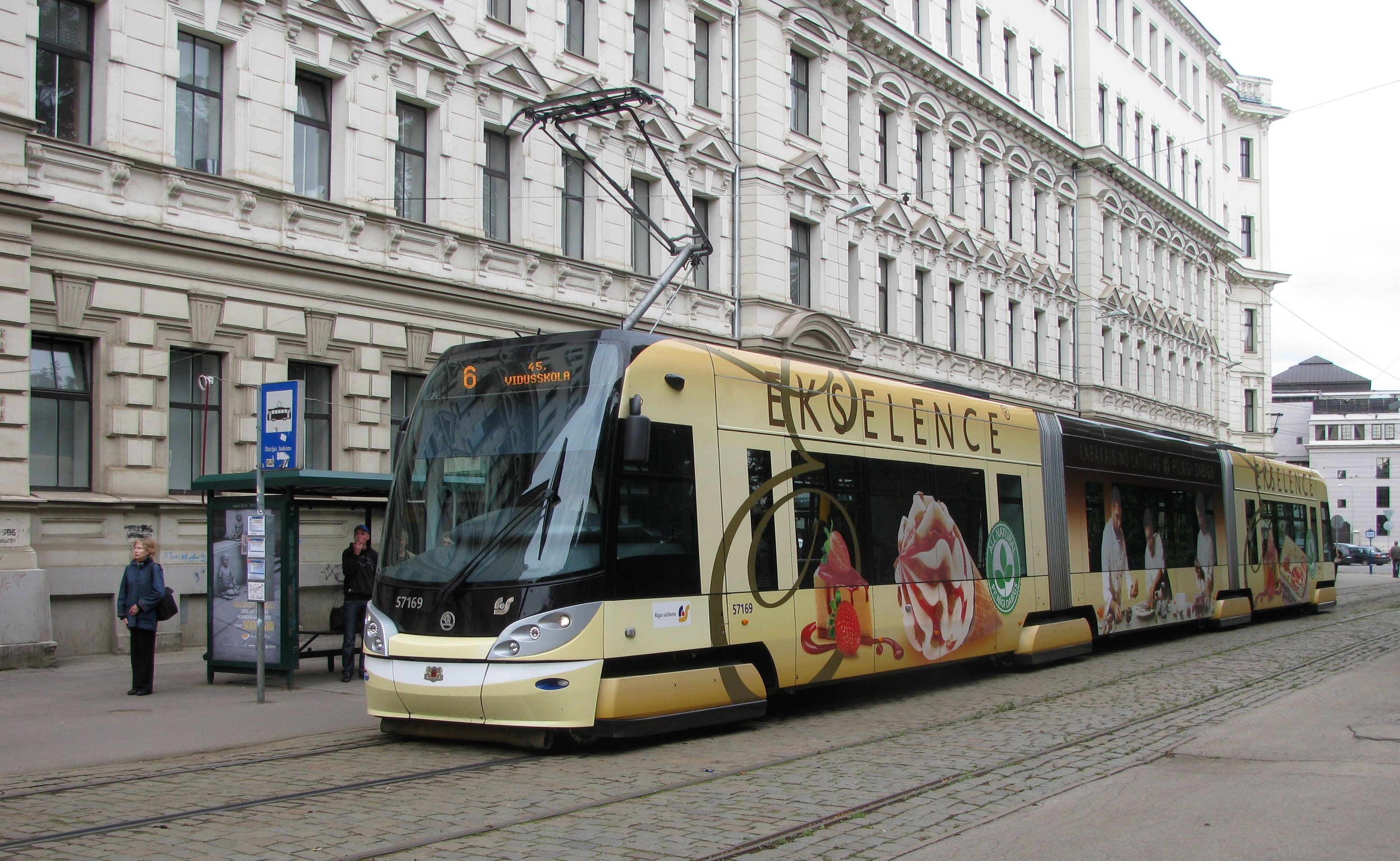 Tramvaj Škoda 15T ev. č. 57169 provozovatele Rīgas satiksme, Radio iela, Rīga